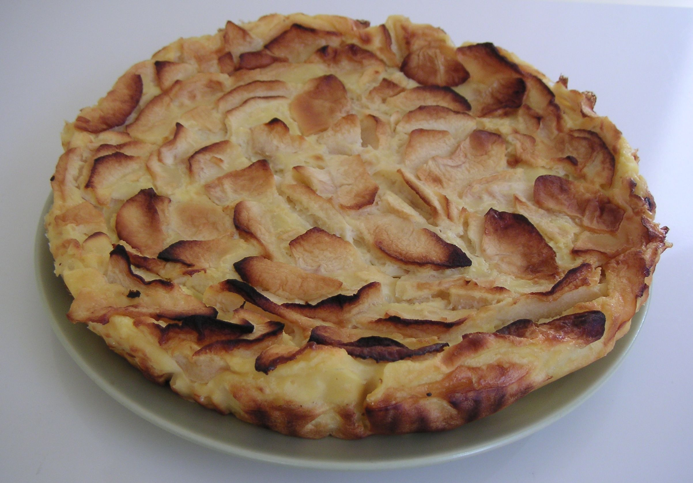 Flonyarda de poma, a la foto no es veu però, al contrari del gargulló, quan aquest pastís es talla, es distingeixen clarament dues capes, a baix la massa no té fruita, mentre que a la de sobre hi ha abondanta fruita barrejada amb la massa, que és de consistència més aviat cremosa, semblanta a la d'un púding. Aquesta és de pomes. No és una tarta, en el sentit que s'entèn a Occitània (i França), perquè no té cap base de pasta fullada o quebrada ni de cap altre tipus. La massa és prou compacta com per poder agafar sense por un extrem una porció amb la mà, sense que la resta caigui. És també diferent del flam patissier francès.